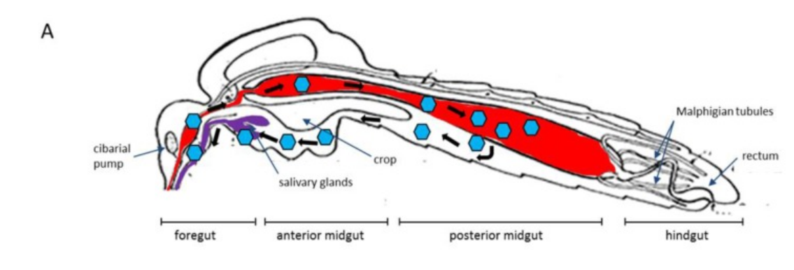 Mécanisme d'infection d'un moustique vecteur par un arbovirus (franchissement des barrières tissulaires par les virions).